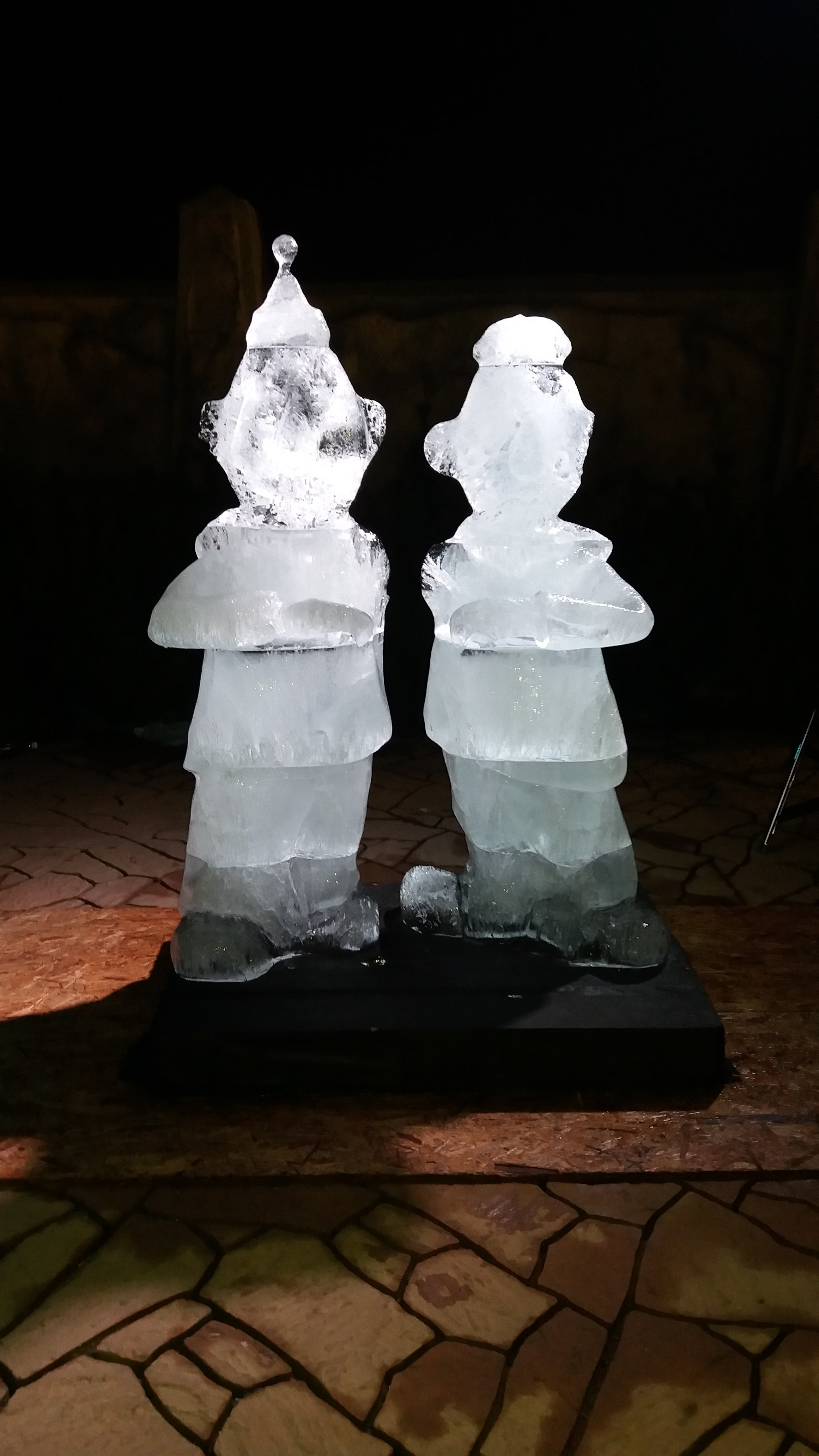 Postavičky Pata a Mata vytvořené z ledu na Festivalu ledových soch na střeše pražského nákupního centra Galerie Harfa.